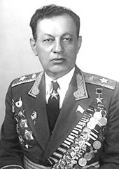 Амазасп Хачатурович Бабаджанян - начальник Военной академии бронетанковых войск им. Р.Я. Малиновского, маршал бронетанковых войск, 1970-е гг.